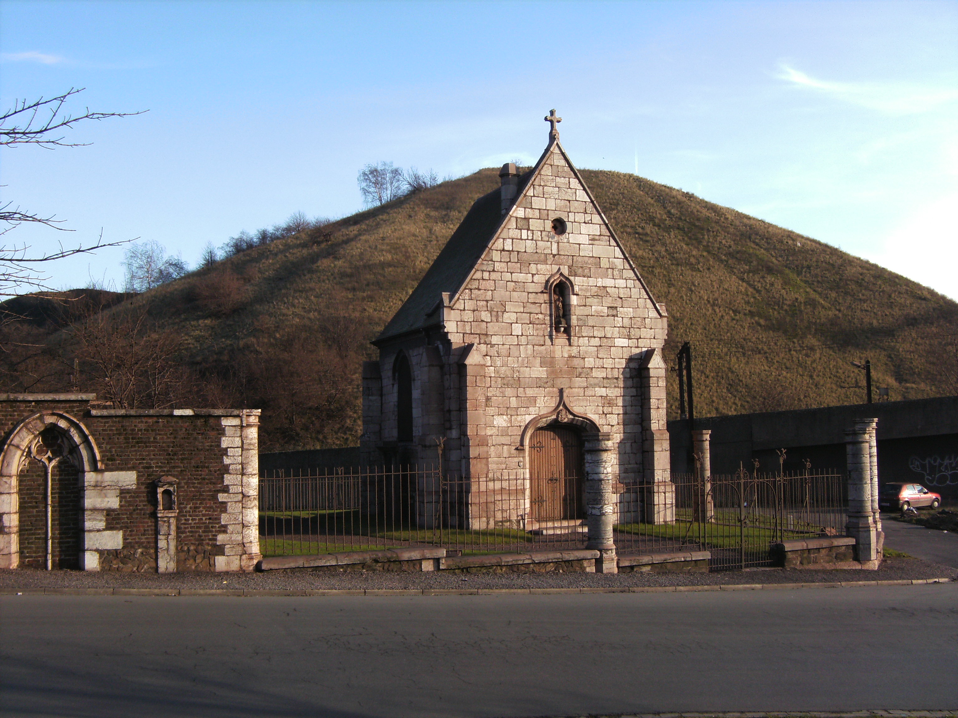 Dampremy (Charleroi - Belgique), Chapelle Saint-Ghislain (choeur de l'ancienne église)